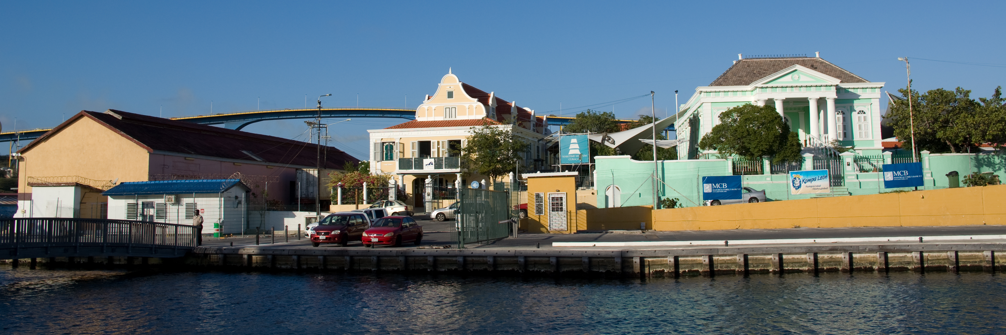 Maritime Museum of Curaçao